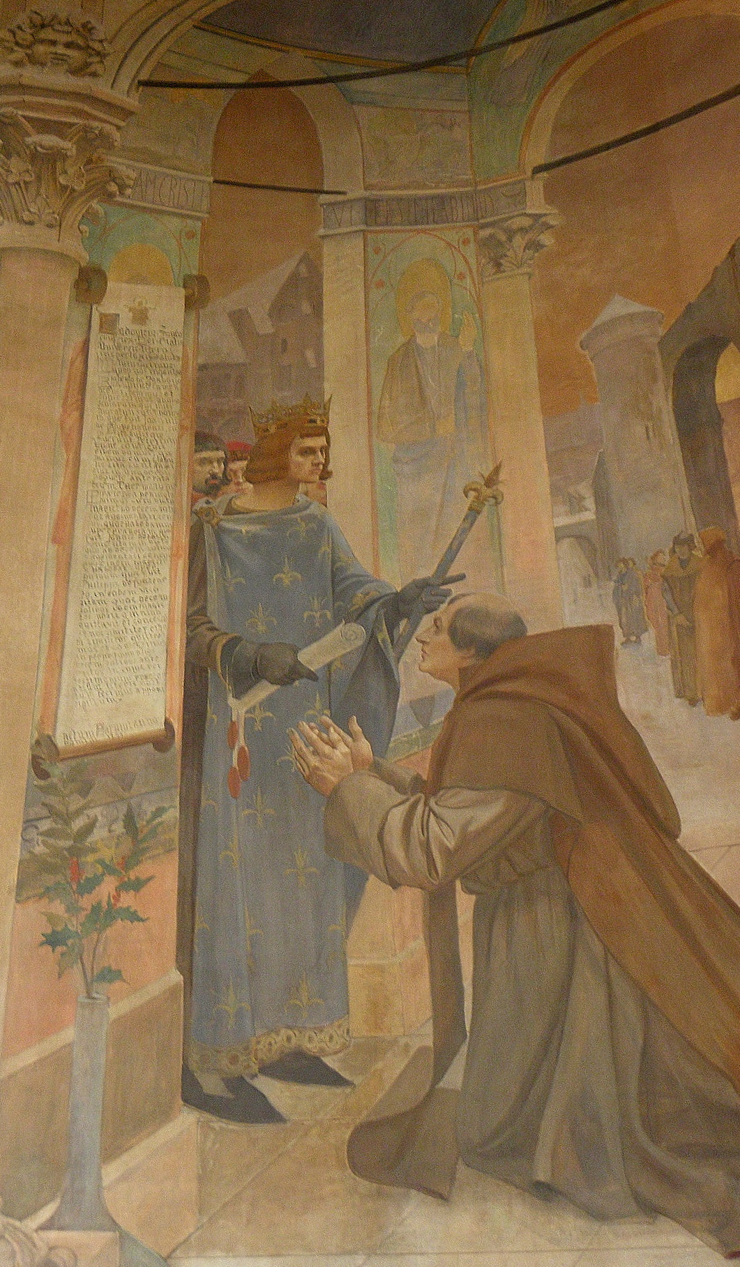 Péristyle de La Sorbonne, Paris (75005). Peinture murale. Robert de Sorbon.